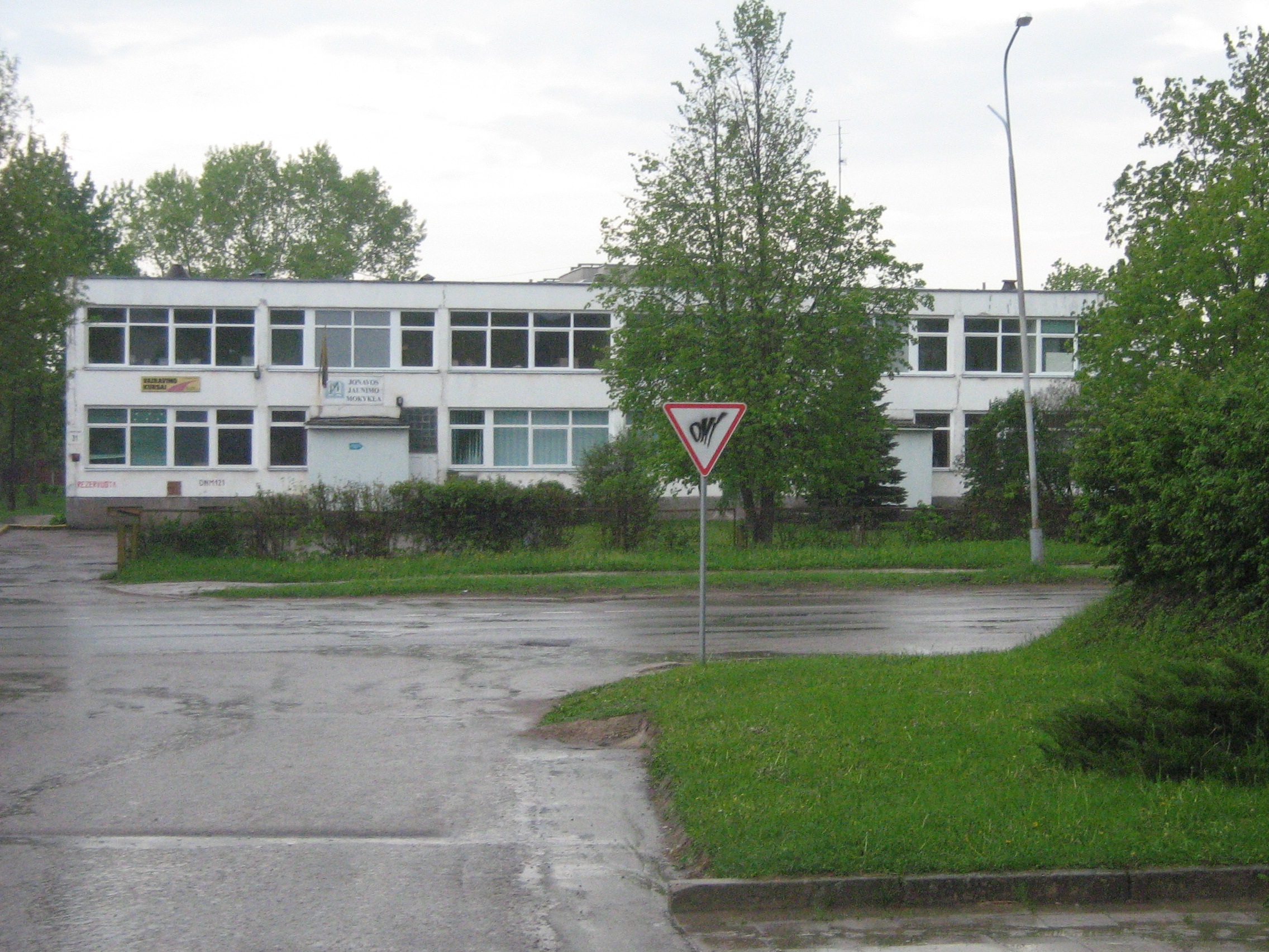 Jonavos Jaunimo mokykla